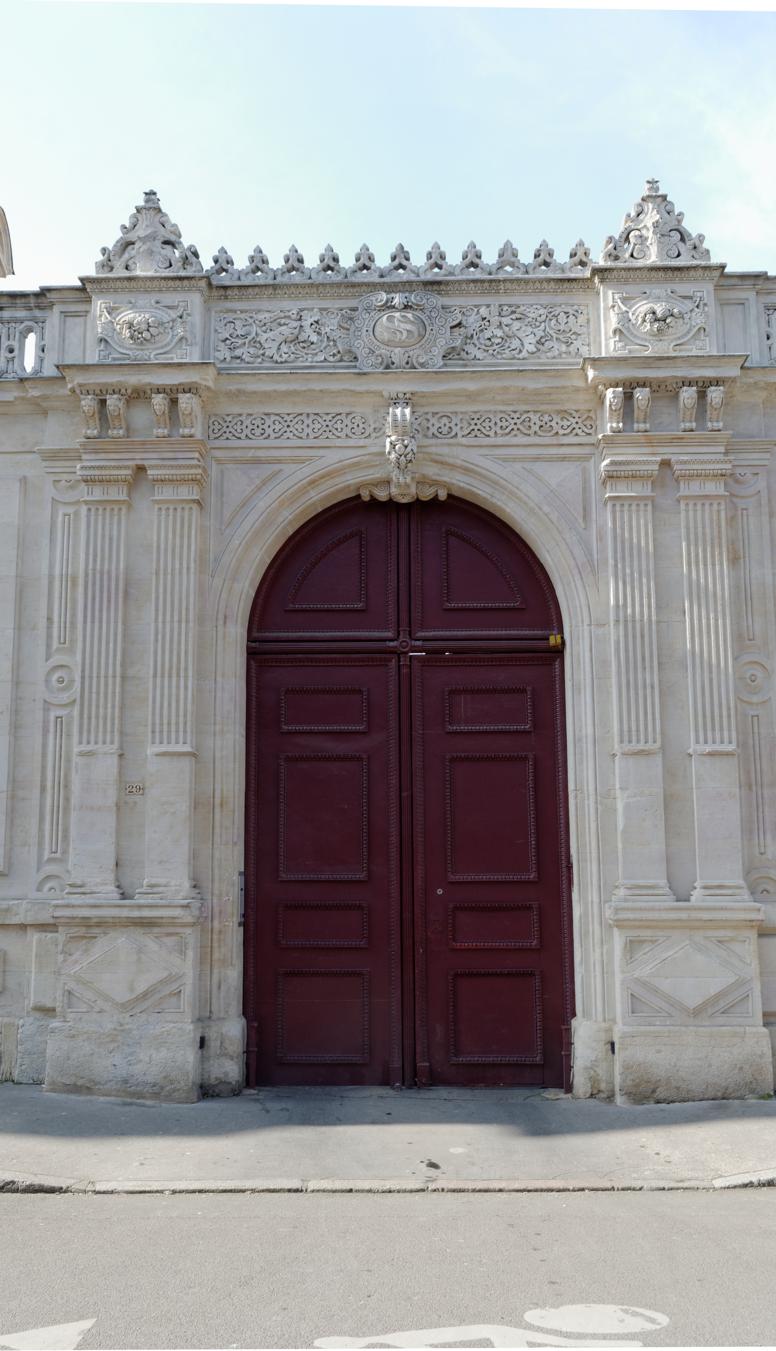 Hôtel de Saint-Seine, 29 rue Verrerie (Inscrit, 2011)